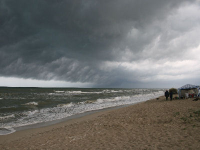 Pregătiri înainte de furtună, Gura Portiței